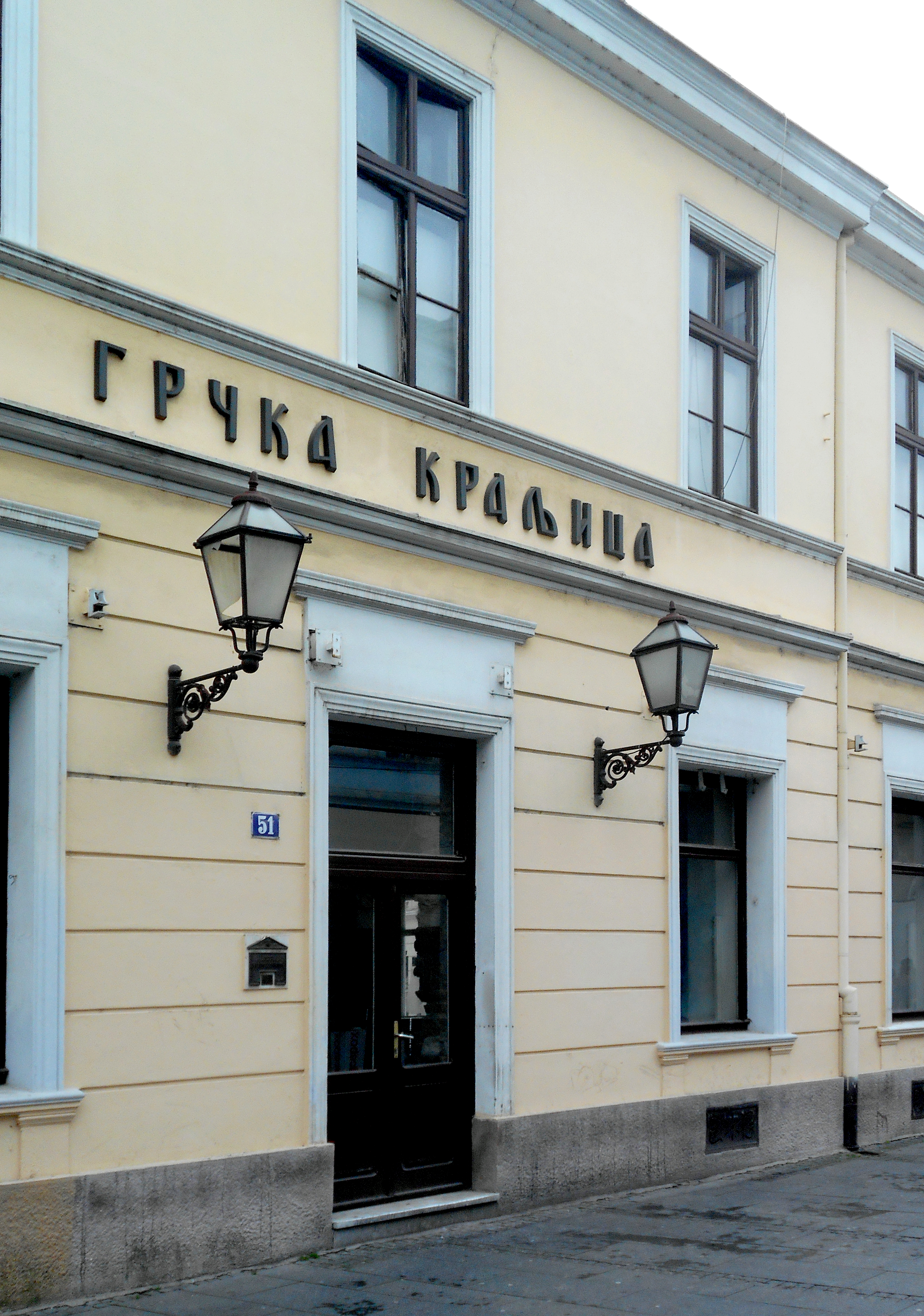 Kafana "Grčka kraljica", Knez Mihailova 51